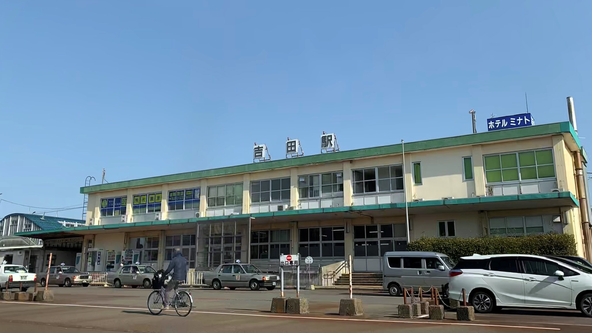 吉田駅の駅舎（2020年3月）